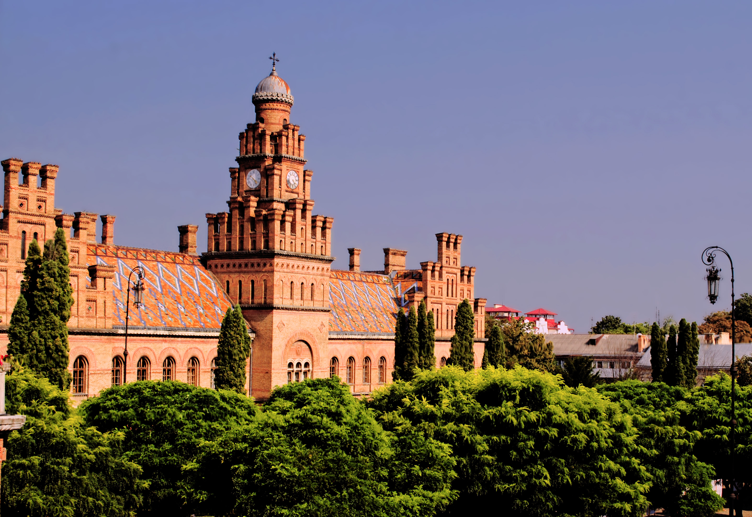 Резиденція митрополитів Буковини та Далмації, Чернівці, вул. М. Коцюбинського, 2